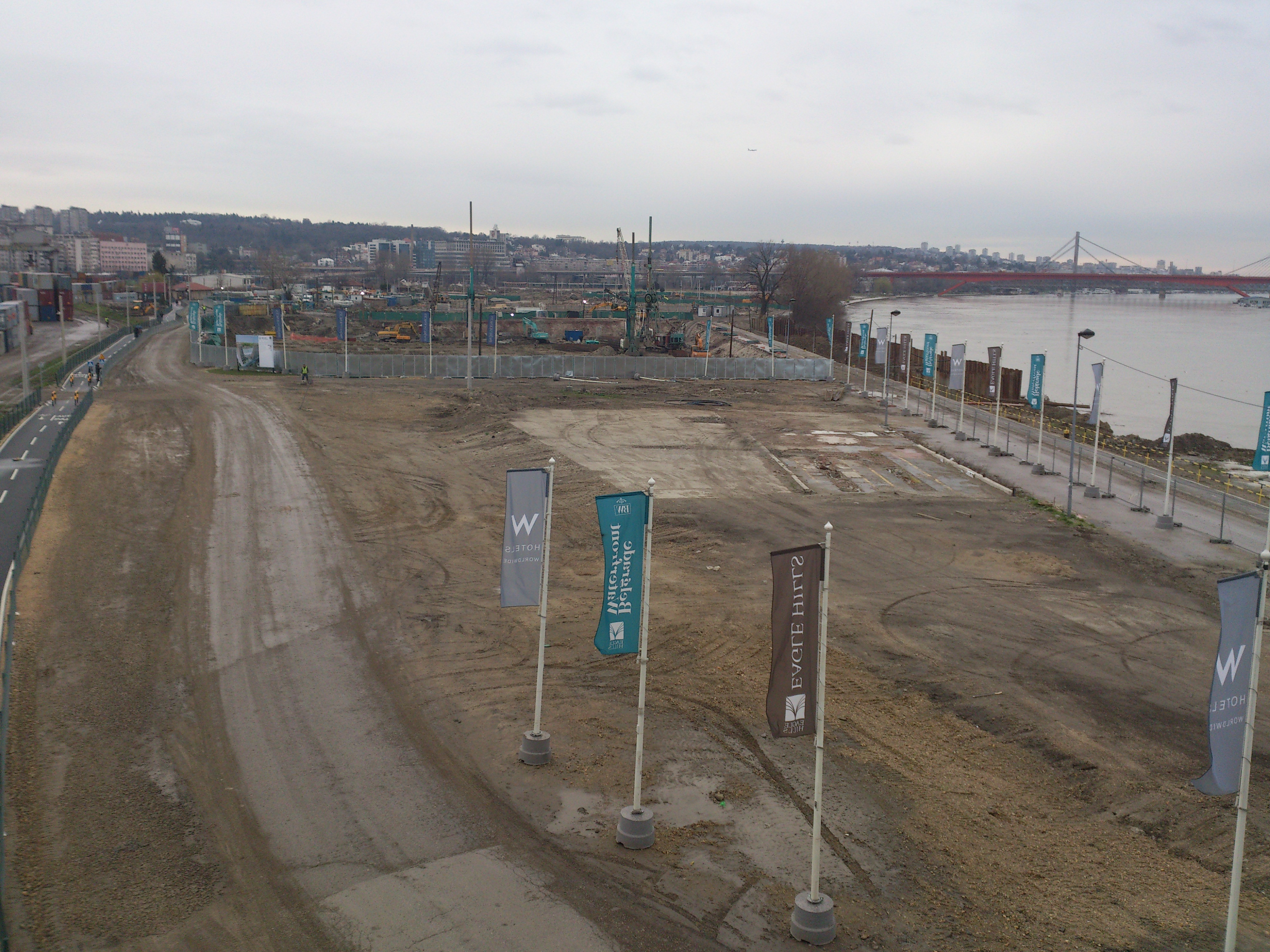 Изградња Београда на води. Фебруар 2016. године.